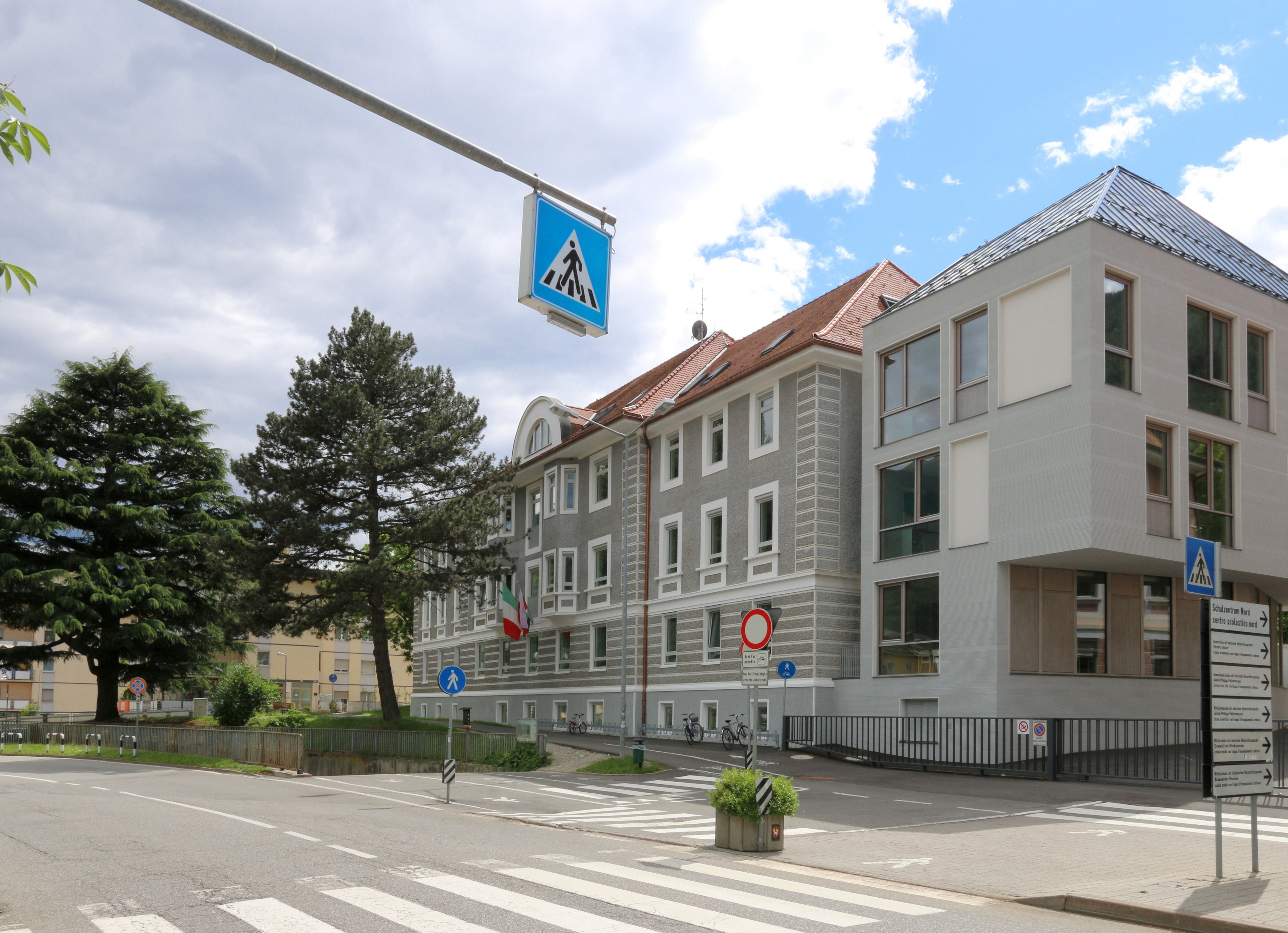 Brixen, Südtirol: Italienische Mittelschule A Manzoni